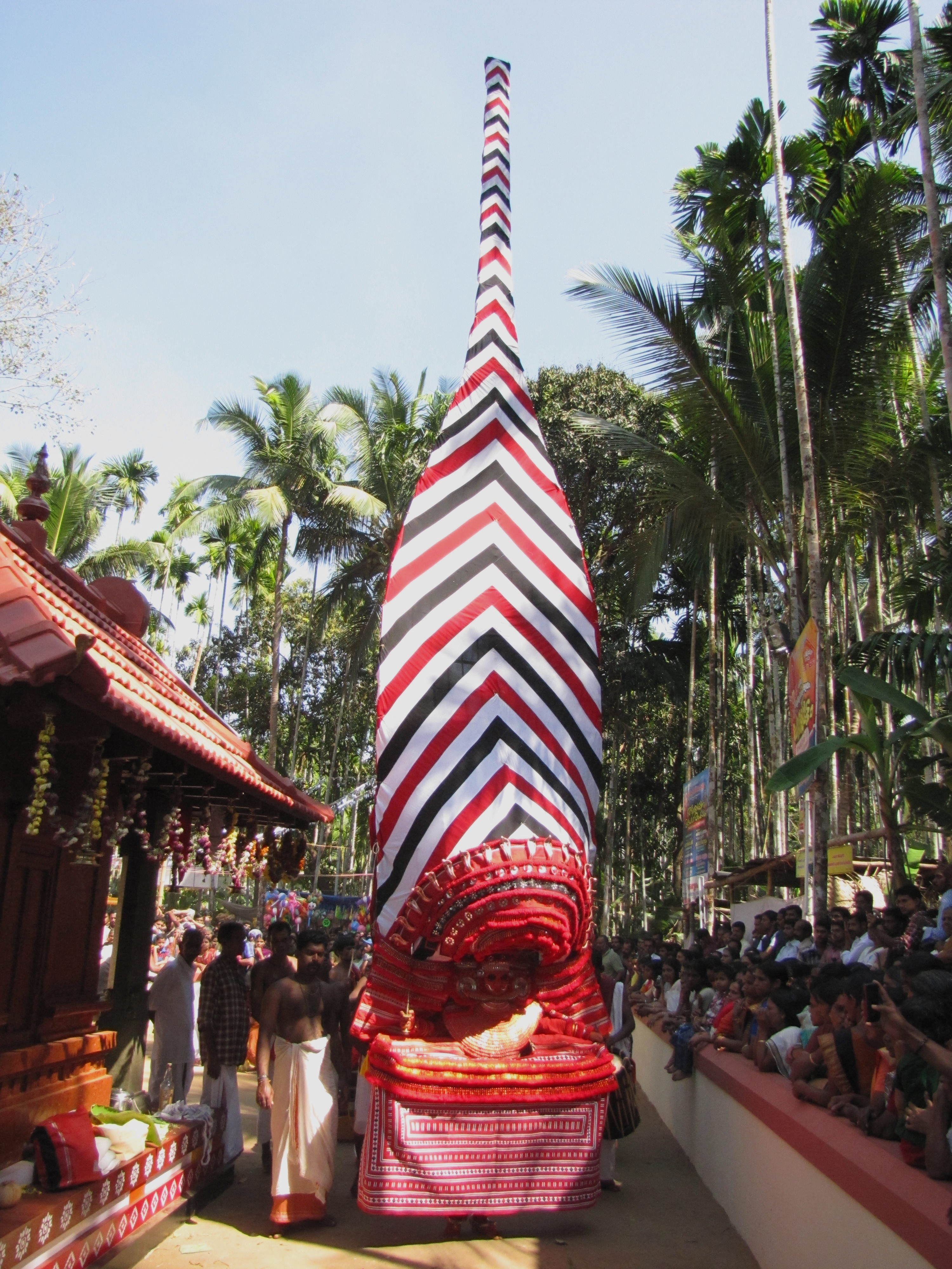 Chukannamma Theyyam